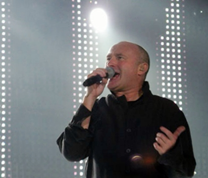 Bildbeschreibung: Phil Collins bei einem Konzert in Düsseldorf am 2005-11-12 * Quelle: * Fotograf/Zeichner: Ulrich Klemt * Datum: 2005-11-12 * Sonstiges: Genehmigung liegt mir vor; mit freundlicher Genehmigung von Deutscher Genesis Fanclub "it"